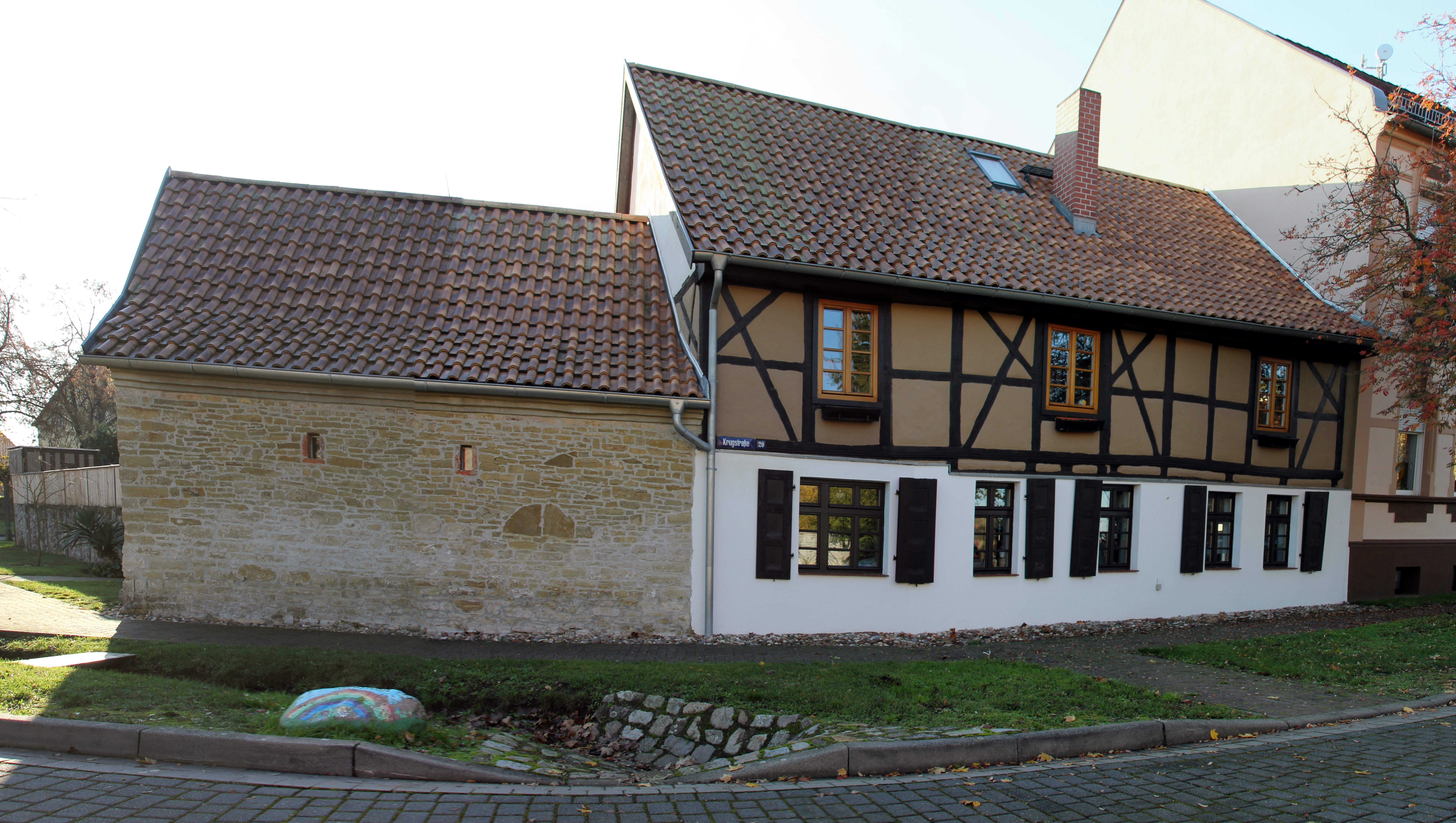 Bauernhof Krugstraße 18-20 Klein Rodensleben